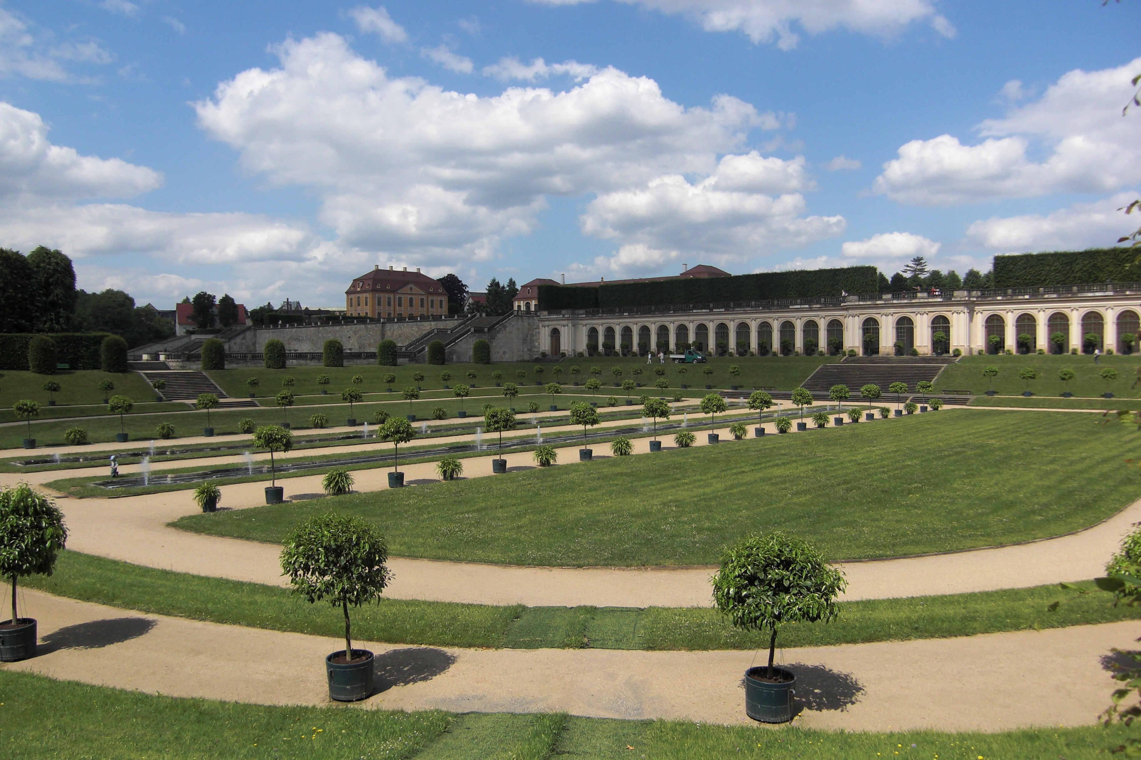 Barockgarten Großsedlitz - Untere Orangerie